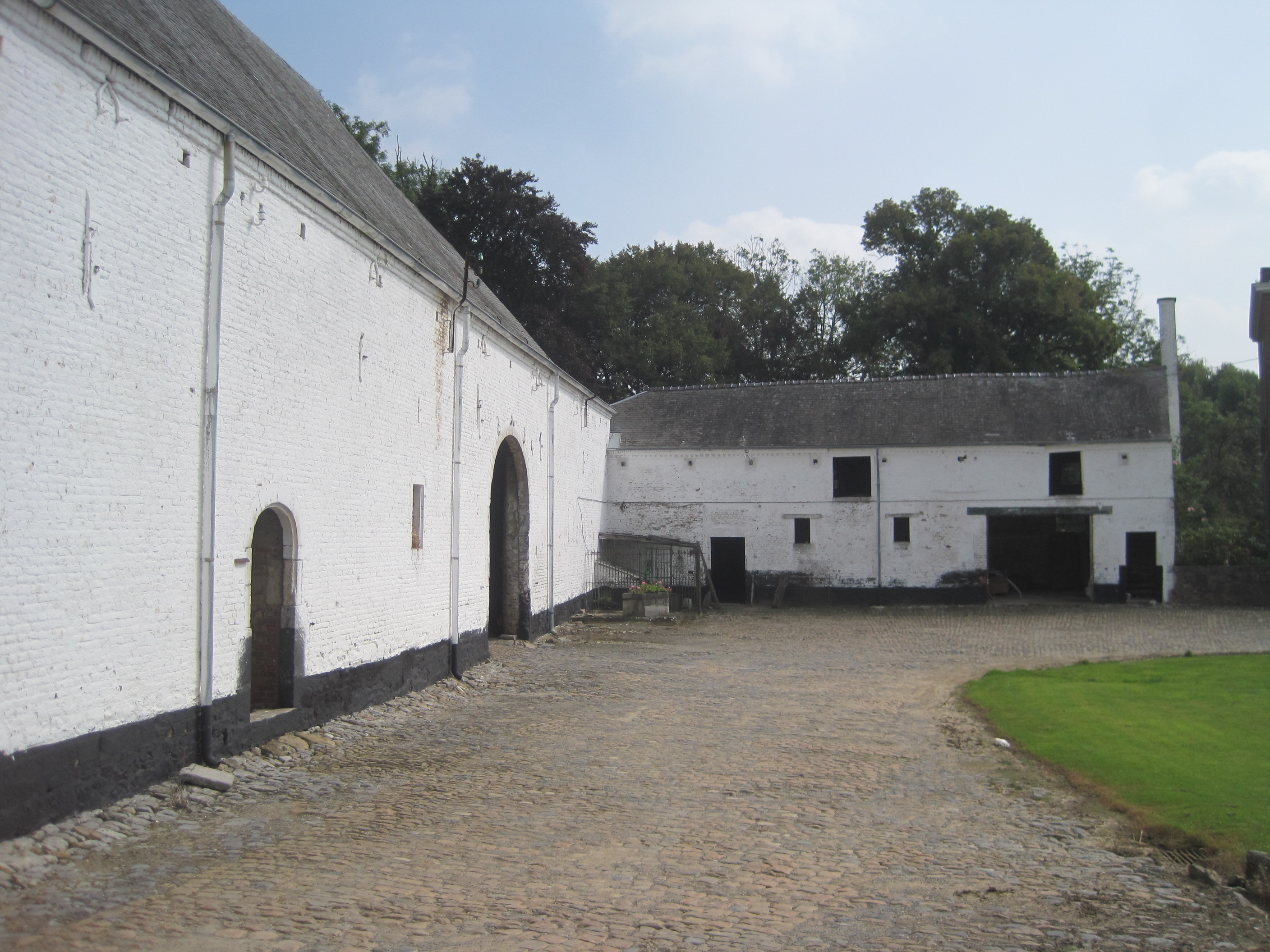 Les façades et toitures de la ferme ainsi que le pavement de la cour de la ferme Monceau à Mehaigne (M) ainsi que l'ensemble formé par cet édifice et les terrains environnants (S)